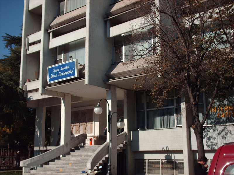 Наслов: Градската библиотека Браќа Миладиновци - Скопје Аутор: Владимир Петков Дата: 10-2006